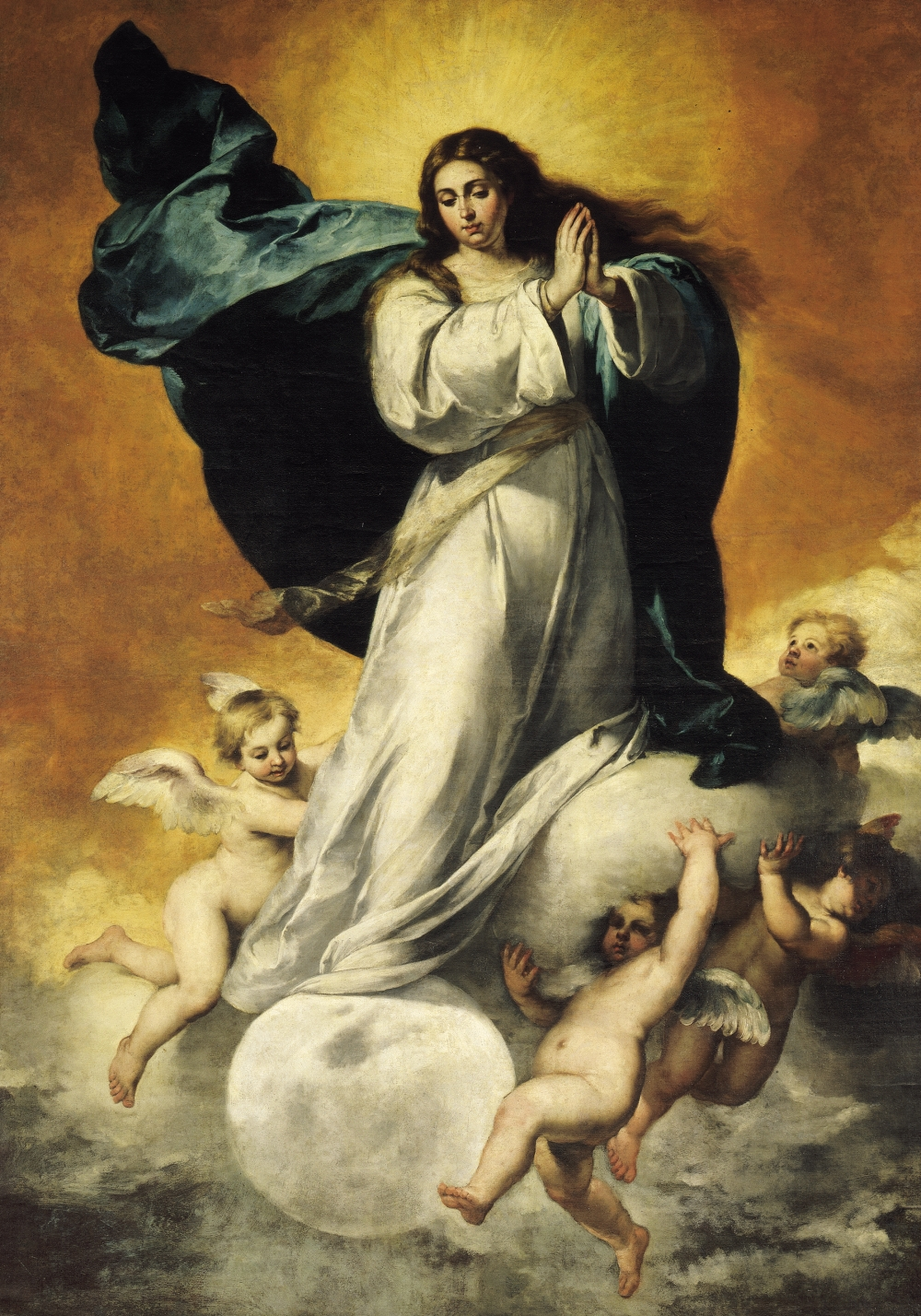 Esta obra, conocida como la Inmaculada Colosal de Bartolomé Esteban Murillo debido a sus grandes dimensiones, procede del desaparecido convento de San Francisco de Sevilla, que fue demolido en el siglo XIX.